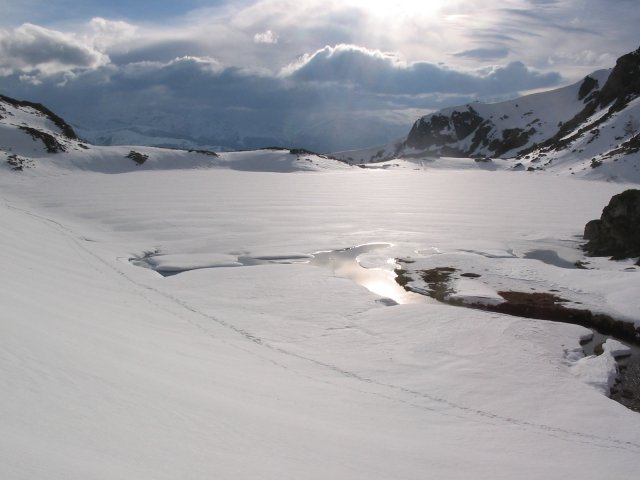 Photo de l'étang d'appy enneigé prise le 18/03/2006 à 17h45 par D.xav